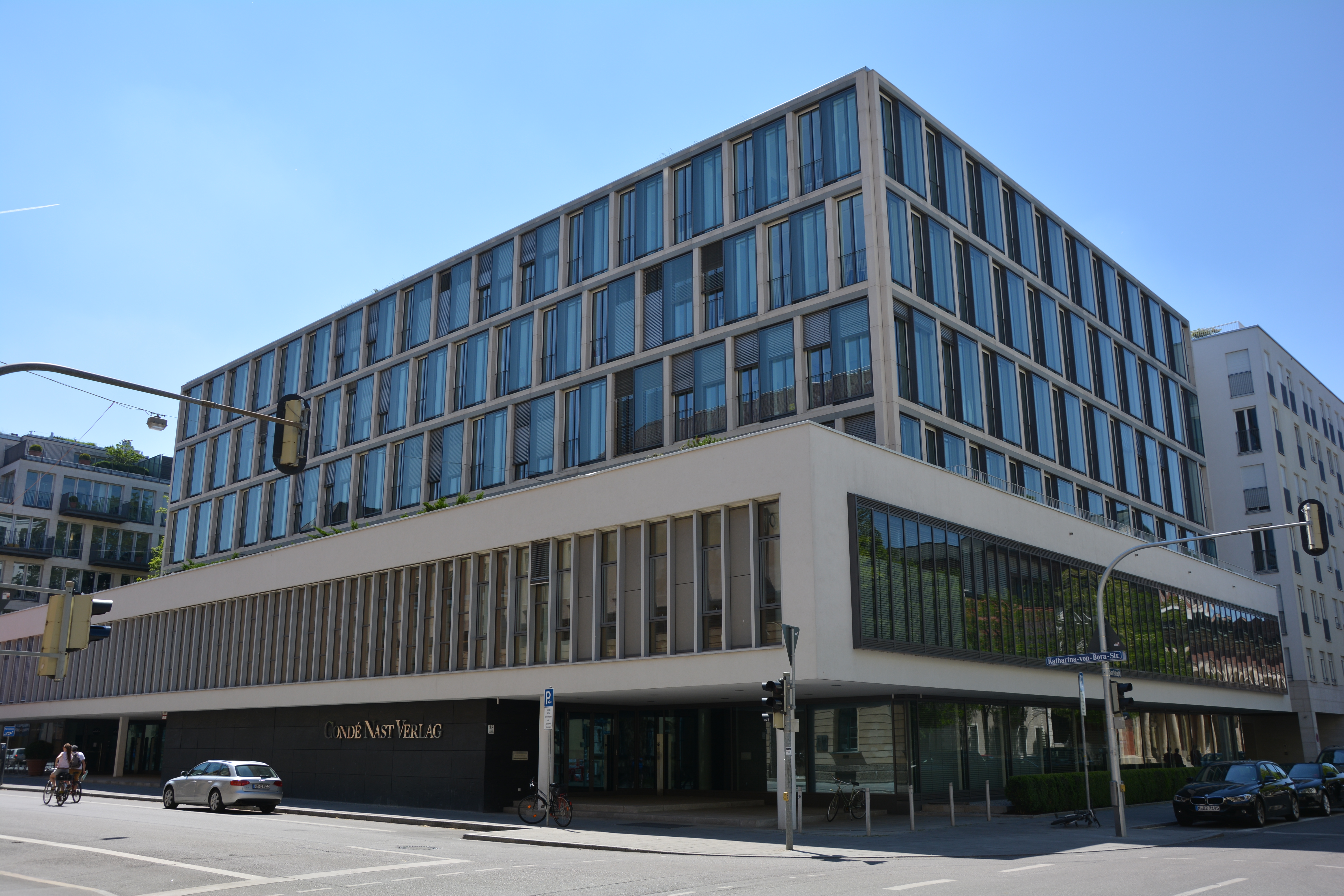 Das Verlagsgebäude von Condé Nast in München.